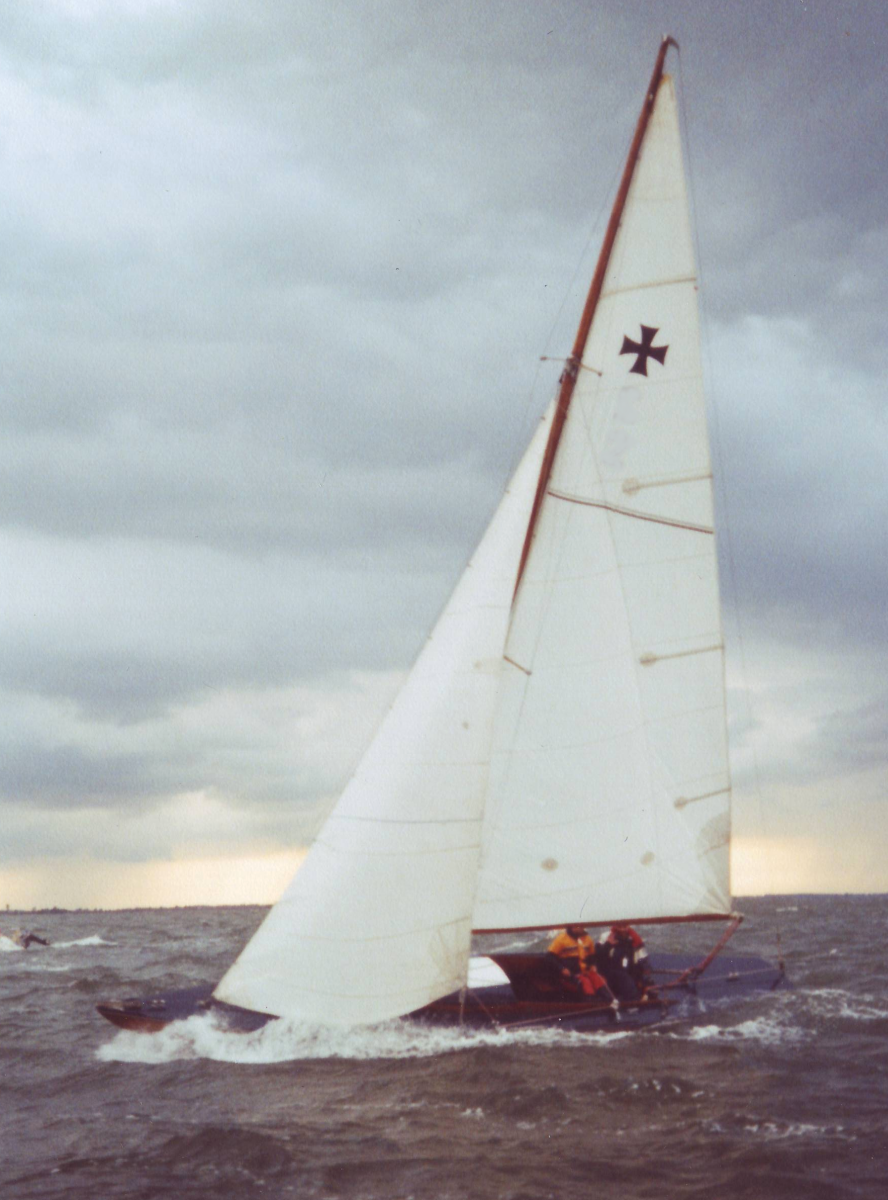 25m²-Einheitskielyacht-Malteserkreuzer, August 2005 auf dem Greifswalder Bodden